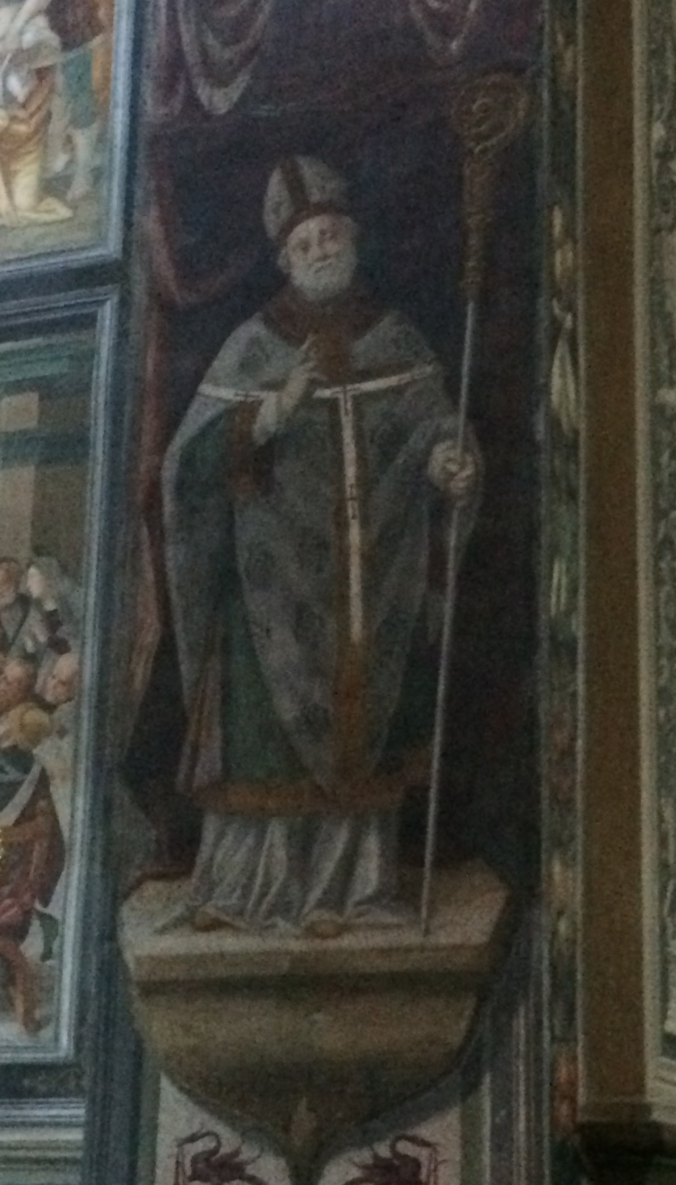 Magno di Milano, arcivescovo meneghino dal 518 al 530, ritratto negli affreschi di Bernardino Lanino, che si trovano nella cappella maggiore della basilica di San Magno a Legnano